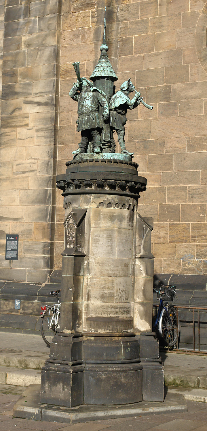 Turmbläser-Brunnen neben dem Bremer Dom. Errichtet: 30. August 1899. Entwurf: Ernst Ehrhardt (1855-1944). Stifter: Franz Ernst Schütte. Material: Stein (Sockel) und Bronze (Figuren). 1942 fiel die Figur einer Metallspende zum Opfer. Der Neuguss wurde am 30. Oktober 1956 enthüllt.